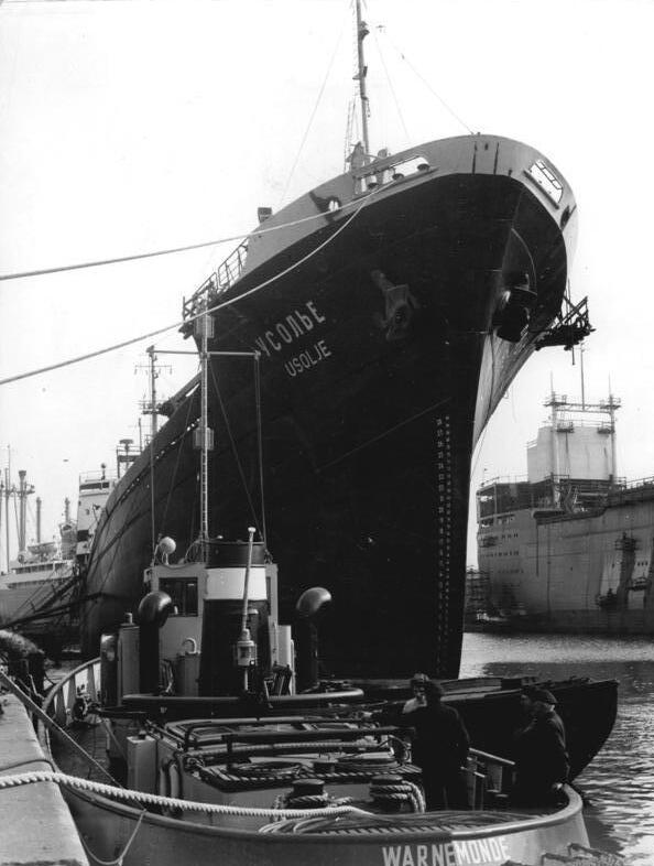 Zentralbild-Mellahn Froe-Ho. 3.4.1959 Werftarbeiter sichern Planerfüllung zum 1. Mai. Die Werktätigen der Wanremünder Warnowwerft haben sich vorgenommen, trotz der anfangs eingetretenen Planrückstände bis zum 1. Mai den Frachter "Erfurt" - den neunten 10 000-Tonner - an die Deutsche Seereederei und den fünften Kohle-Erz-Frachter "Usolje" an den sowjetischen Auftraggeber auszuliefern. Dazu hAben zahlreiche Brigaden Einzel- und Kollektivverpflichtungen übernommen, deren Erfüllung von 16 Ingenieuren des Betriebsbereiches Ausbau unterstützt wird. UBz: Der 7 000-Tonnen-Kohle-Erz-Frachter "Usolje" am Ausrüstungskai der Werft."